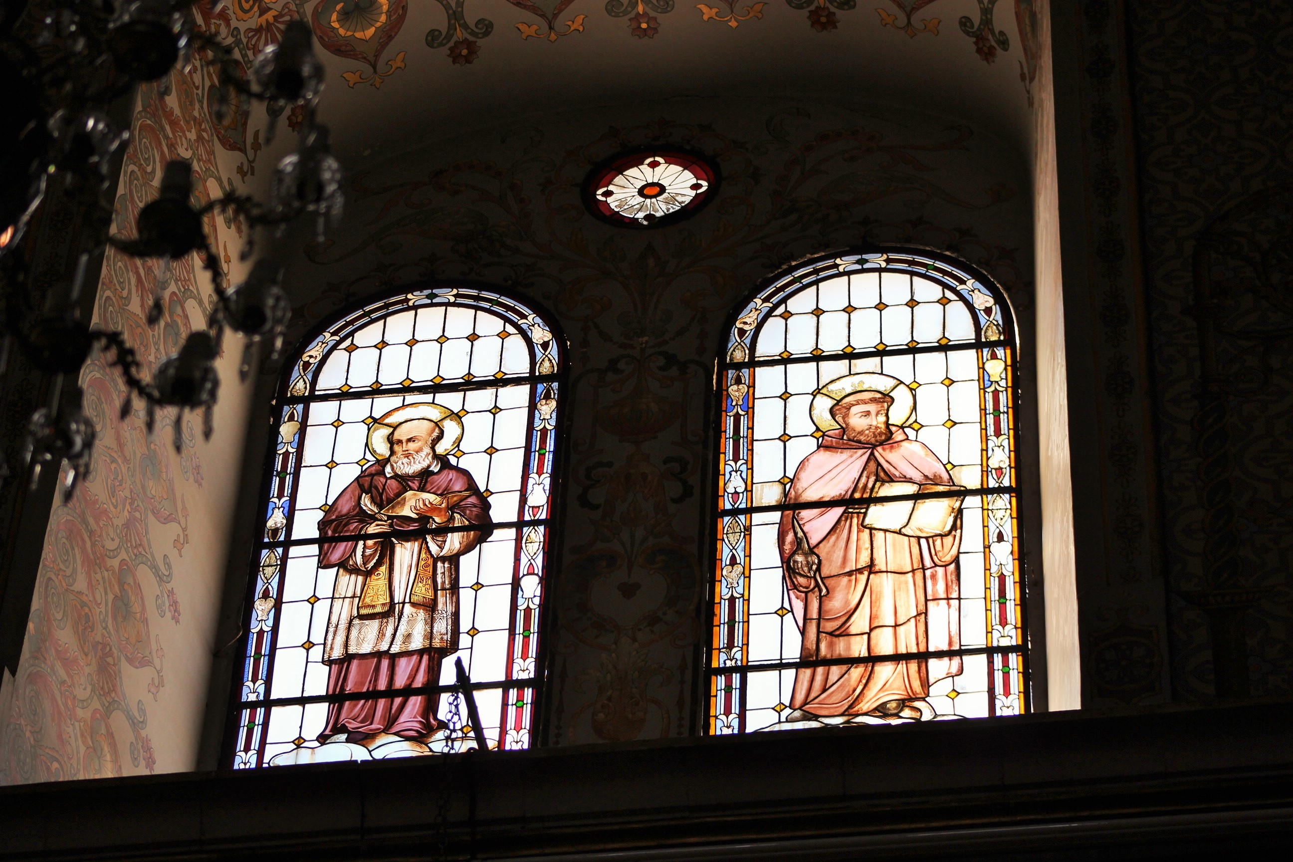 Vitrales